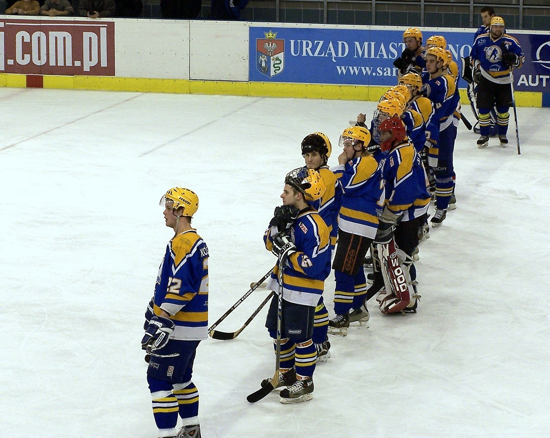 HK VTJ Trebišov before match KH Sanok vs. HK Trebiszów